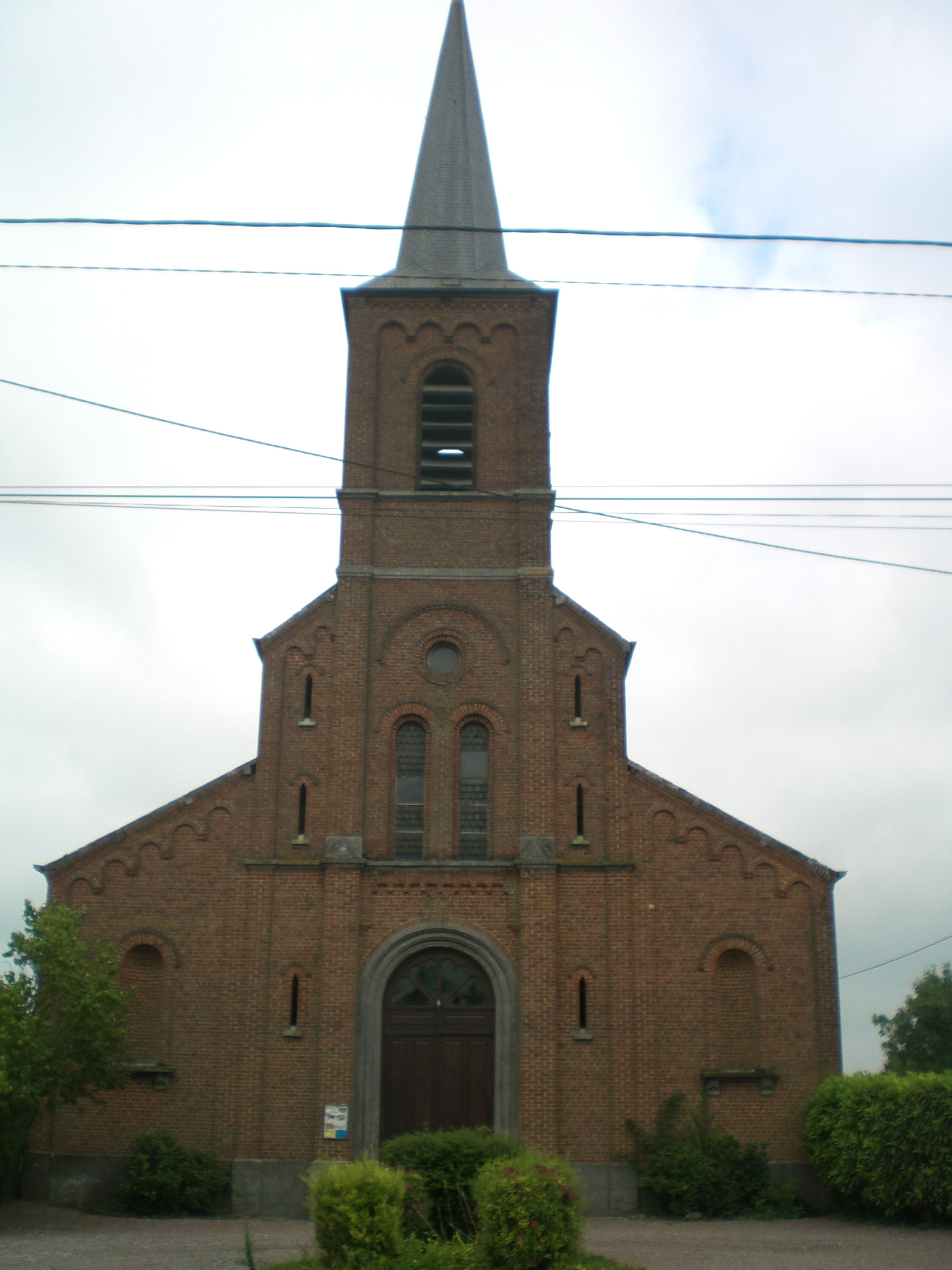 eglise de Haut-Lieu